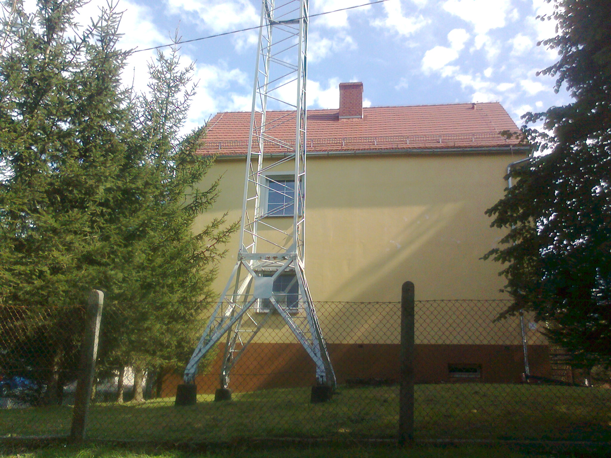 Jasienica Górna, budynek byłej Strażnica Wojsk Ochrony Pogranicza Jasienica Górna (WOP), od 16 maja 1991 roku Strażnica Straży Granicznej w Jasienicy Górnej (SG), a od 24 sierpnia 2005 roku placówka Straży Granicznej, do 14 czerwca 2006 roku — widok z drogi granica państwa. Obecnie budynek mieszkalny